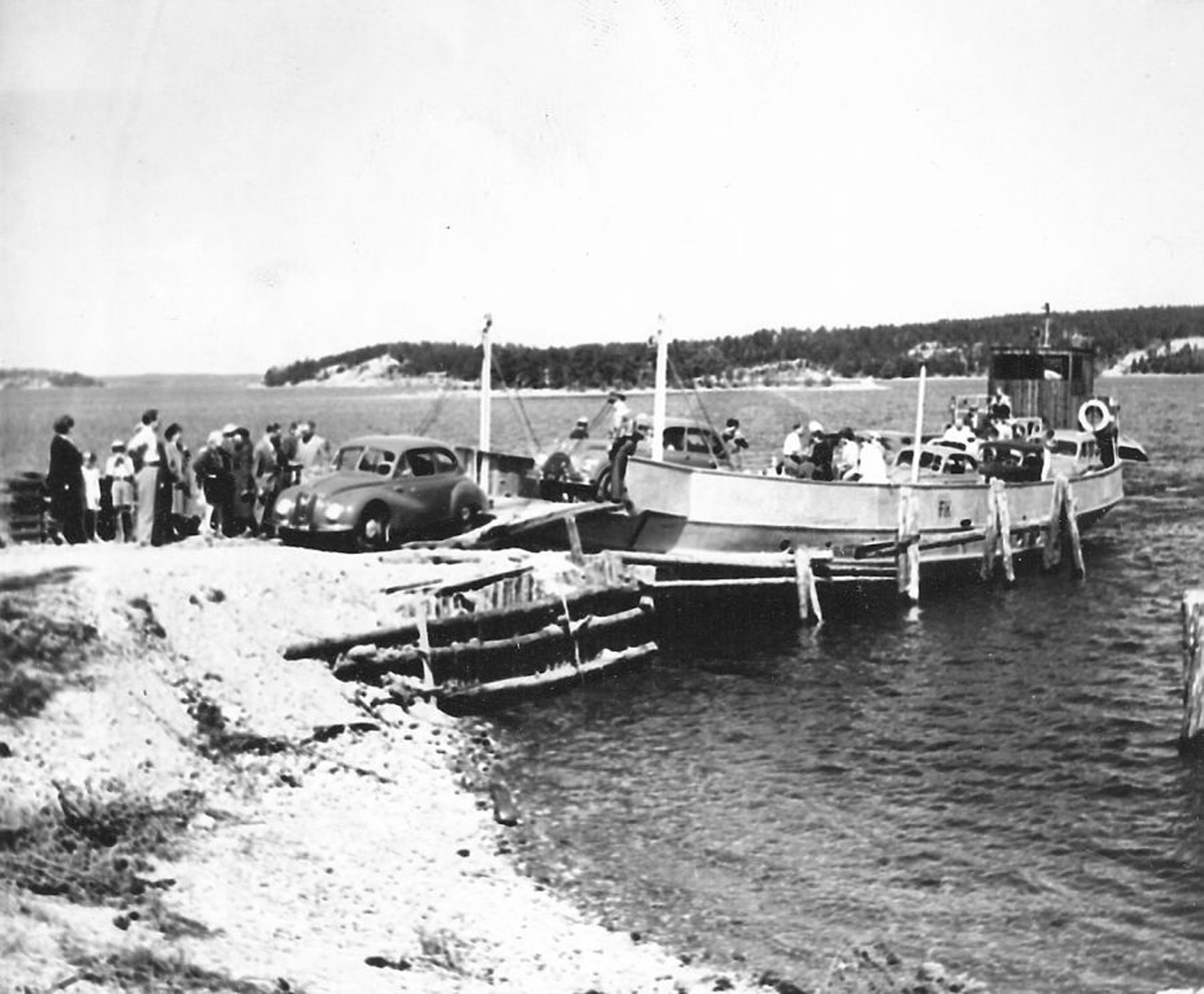 Autolautta Fix liikennöi Paraisilta Nauvoon